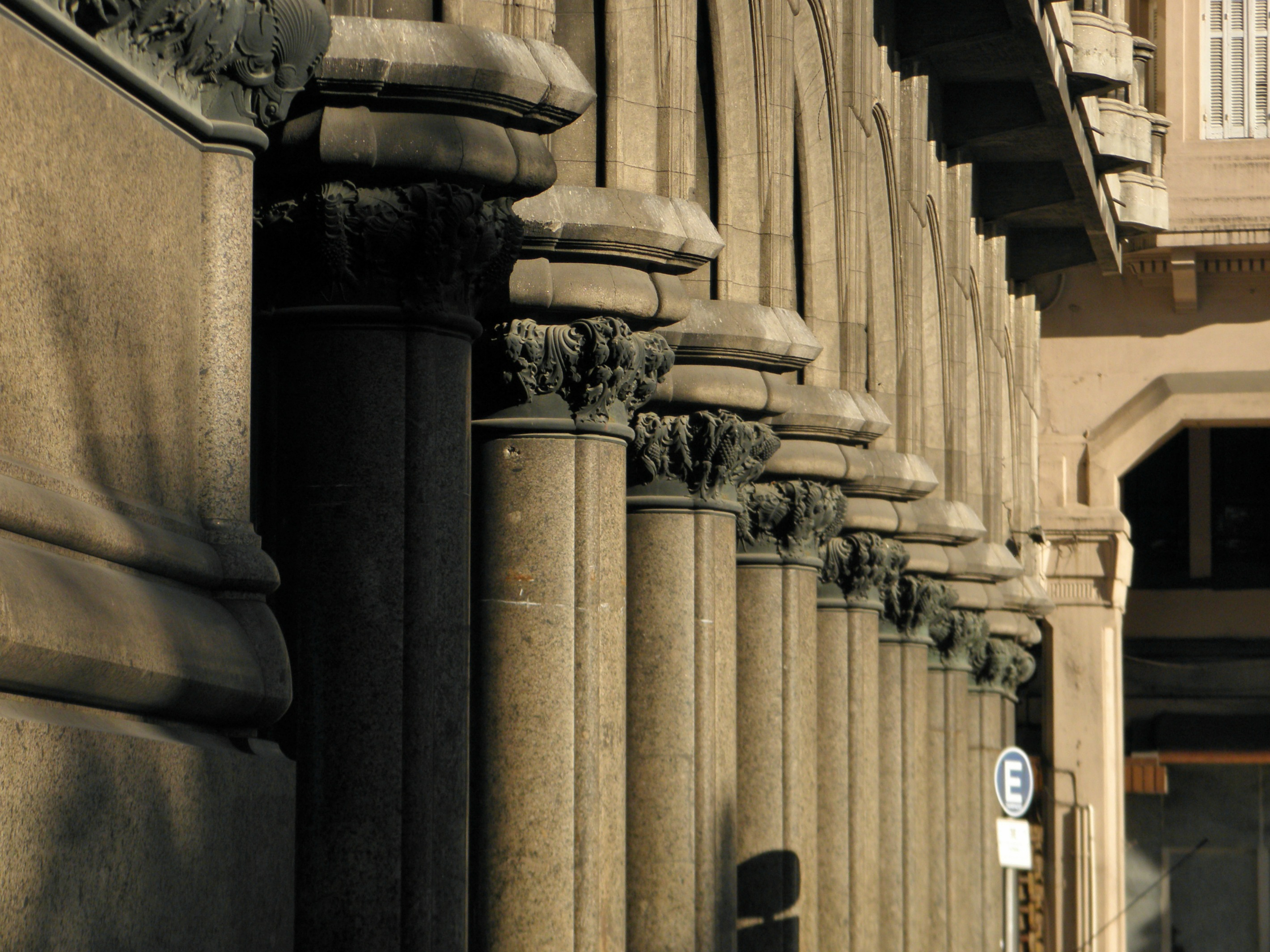 Columnas del exterior de la planta baja del Palacio Salvo